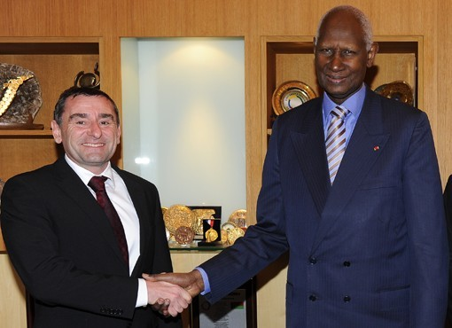 Dominique Hoppe, Président de l'AFFOI rencontre Abdou Diouf, secrétaire général de l'OIF